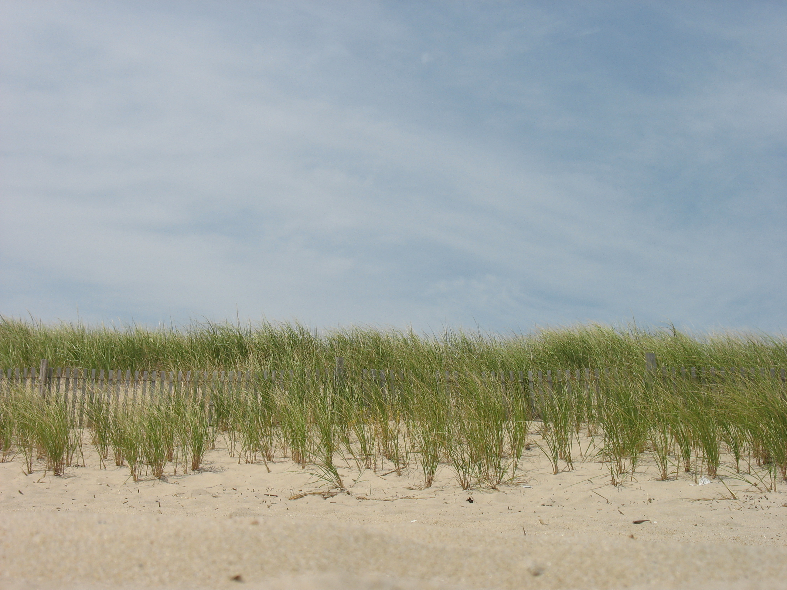 Delaware Beaches State Park